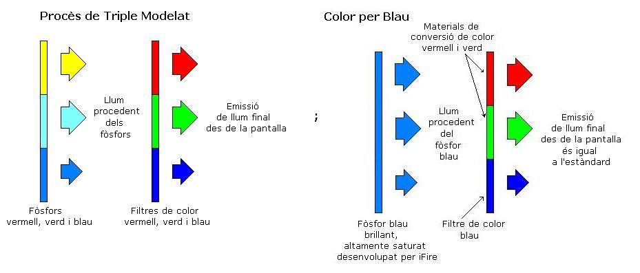 triple modelta comparat amb el color per blau